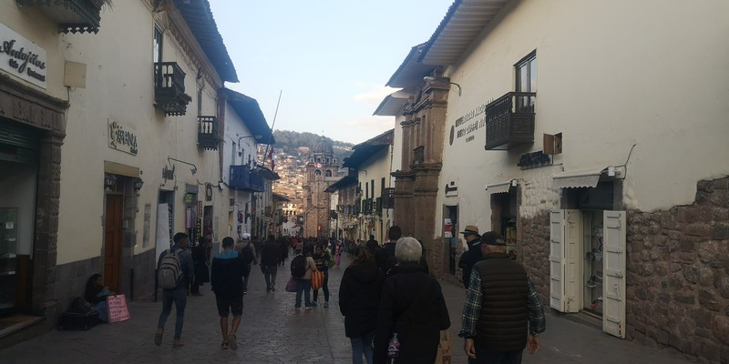 Vista de la calle Marqués en Cusco, Perú.